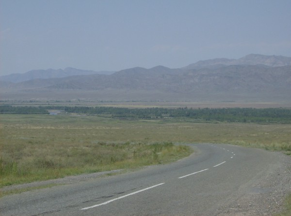 Спуск к Хемчику за Кызыл-Мажалыком